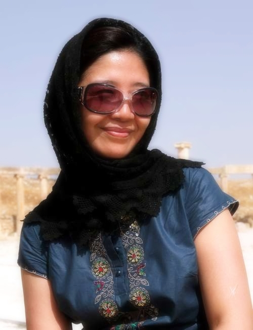 2009年7-11月，我在叙利亚工作时拍摄了这张自拍像。